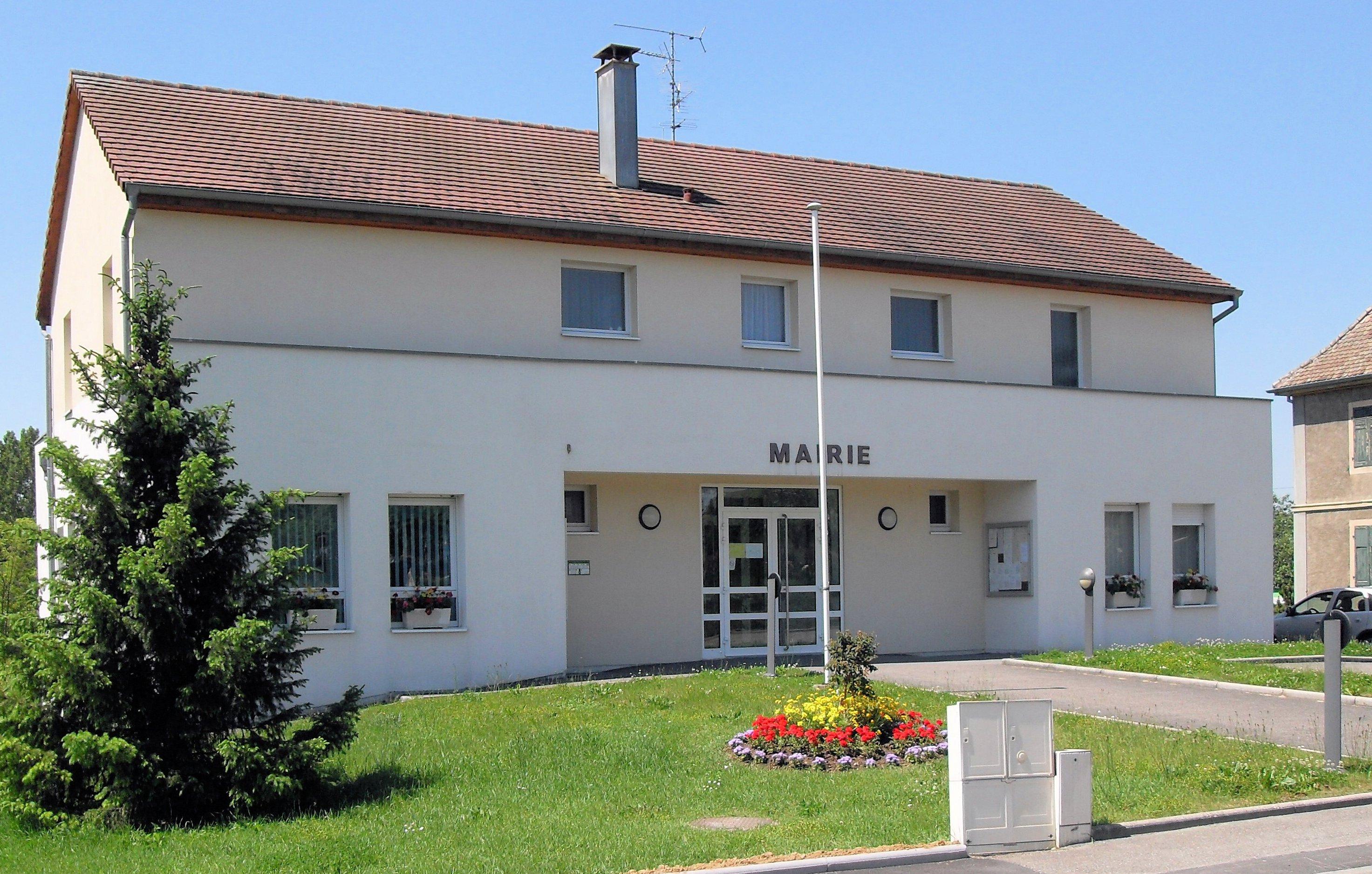 La mairie de Saint-Bernard